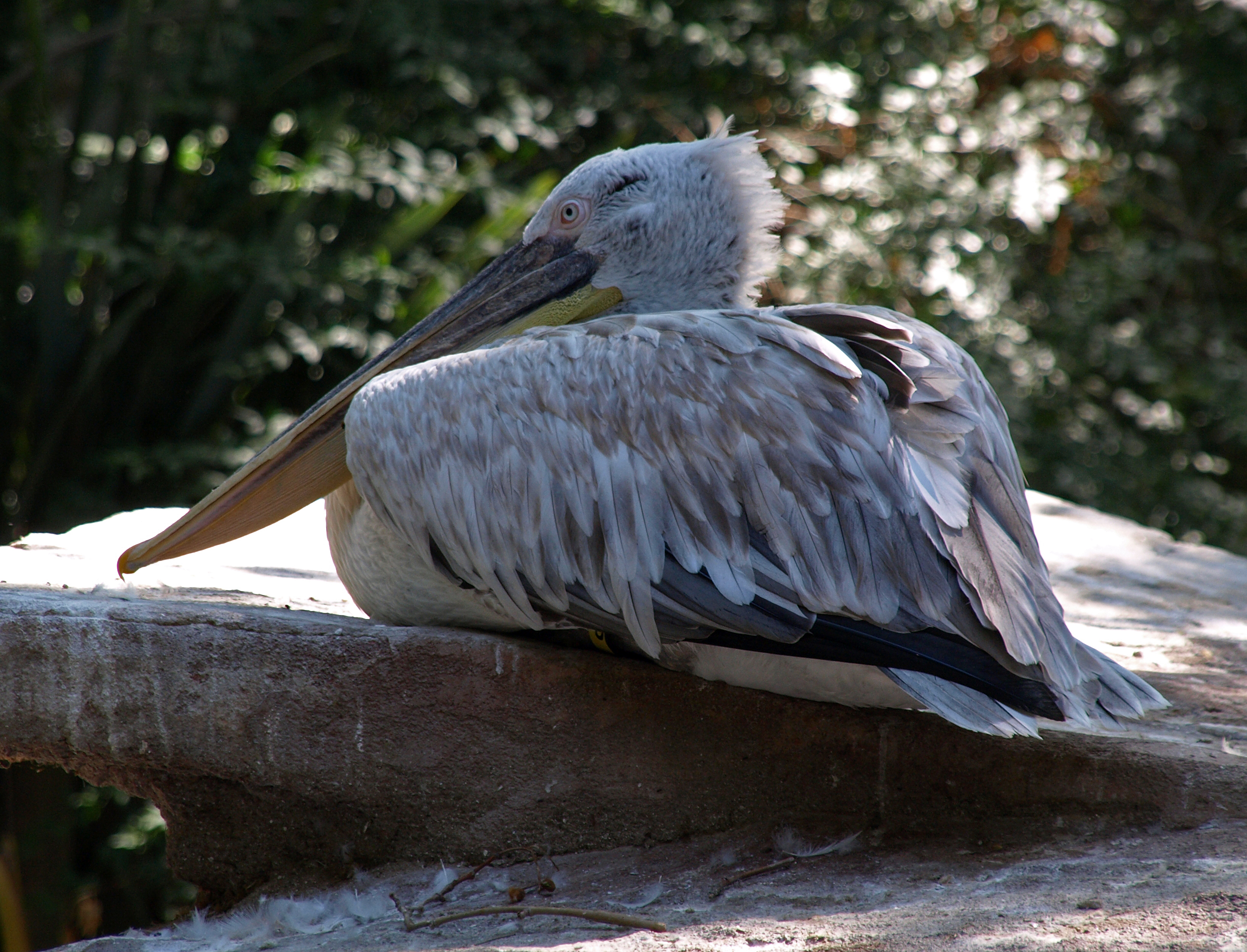 Pelecanus crispus, en el Zoológico de Barcelona.